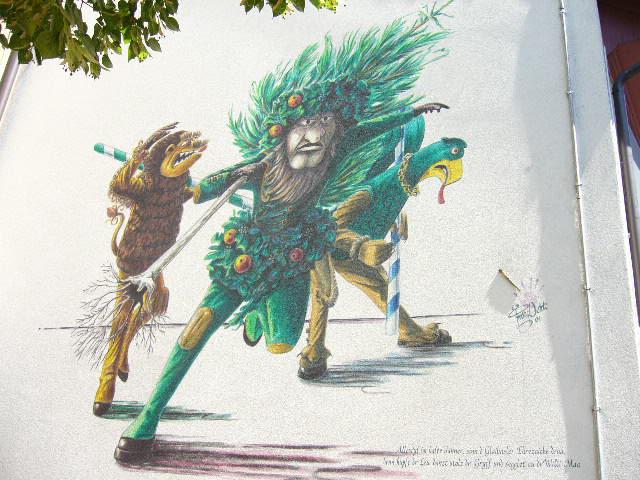 Wandgemälde im Kleinbasel mit dem Schriftzug: Allewyl im kalte Jänner, sinn d' Glaibasler Ehrezaiche draa, denn hüpft dr Leu, danzt stolz dr Gryff und segglet au dr Wildi Maa. Sonstiges